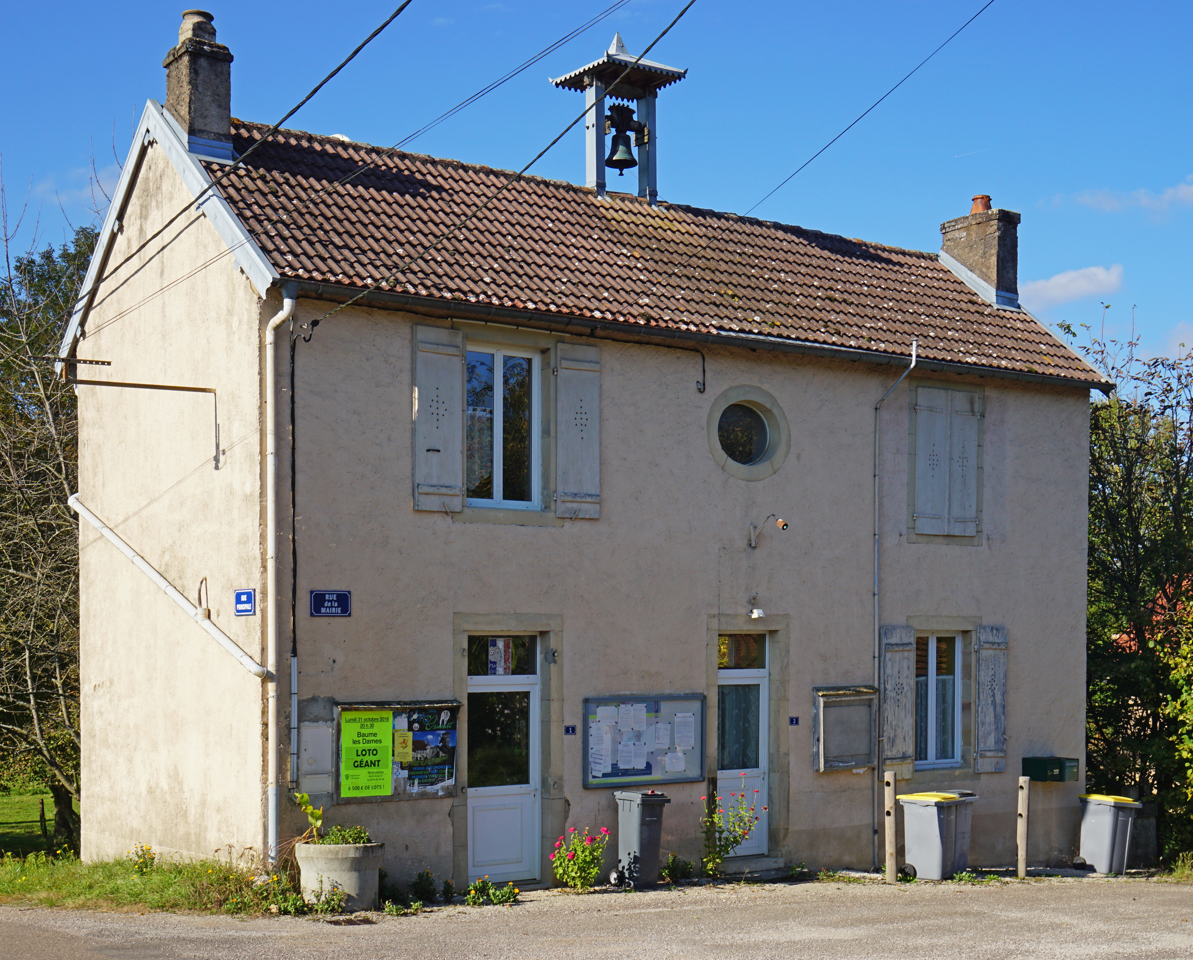 La mairie de Tressandans.